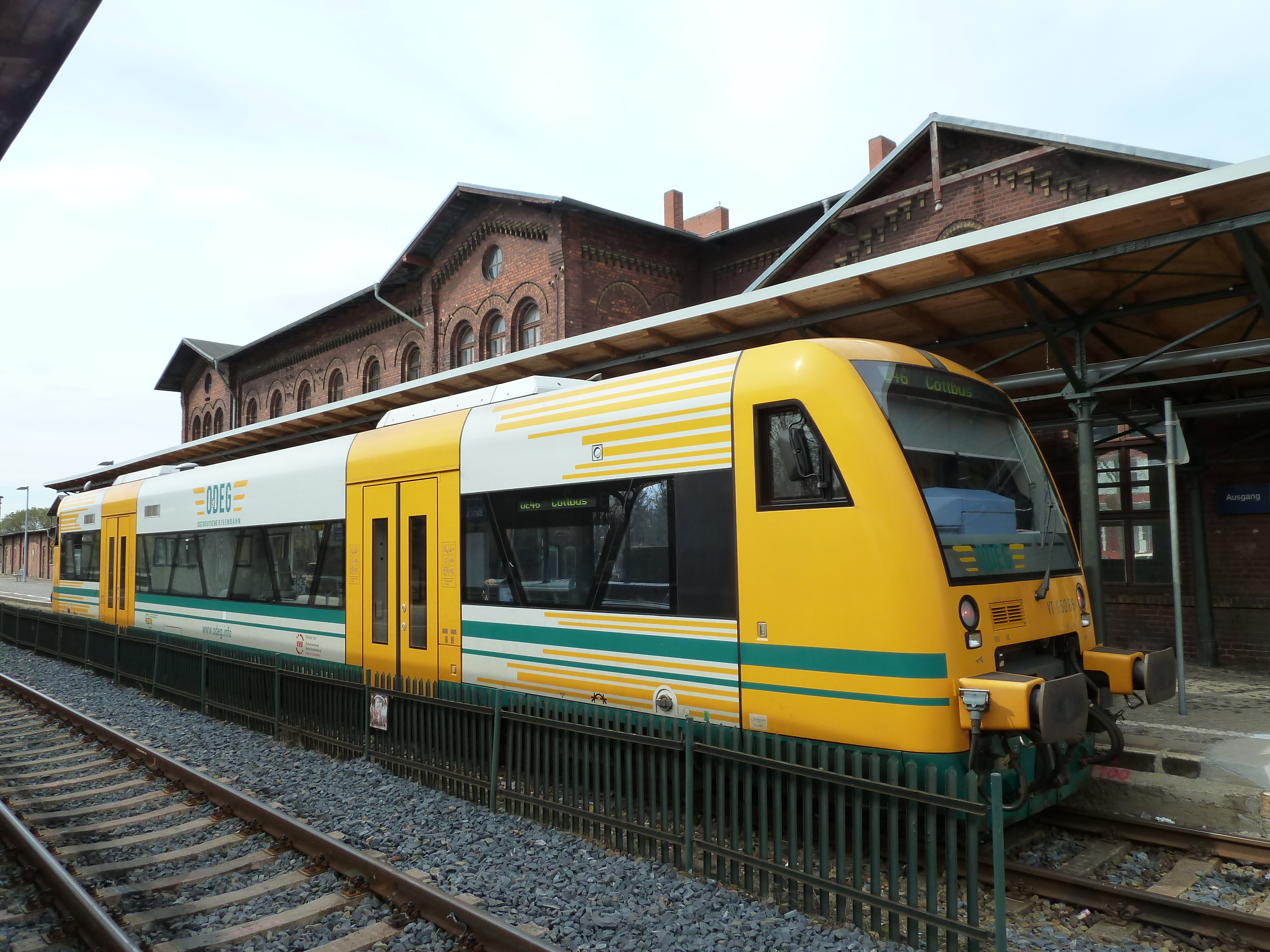 Bahnhof Forst, Triebwagen nach Cottbus, betrieben von der Ostdeutschen Eisenbahngesellschaft (ODEG)